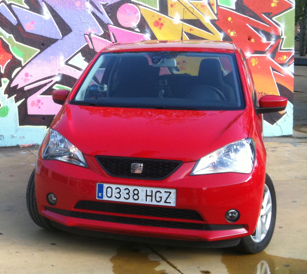 SEAT Mii front